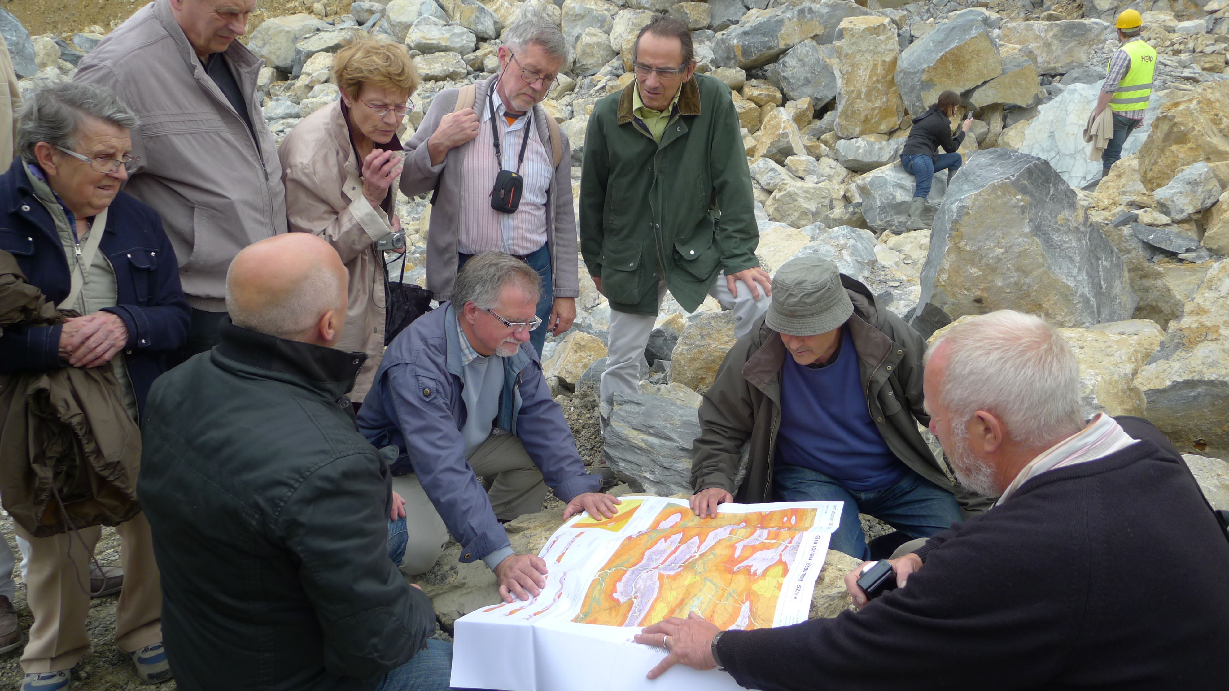 Sortie géologique en Belgique, CSENPC 2012